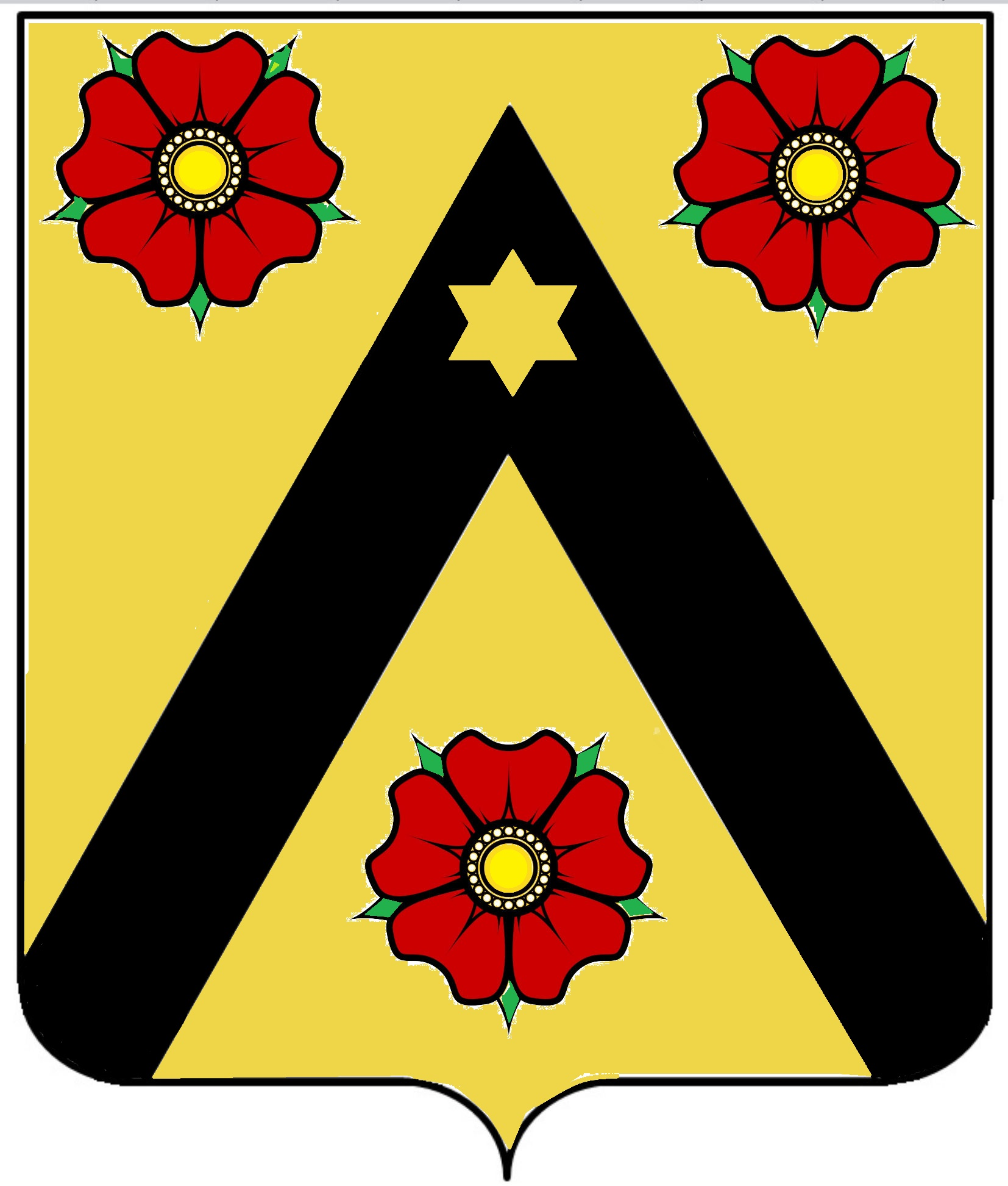 wapenschild van NIeulande ex sinay